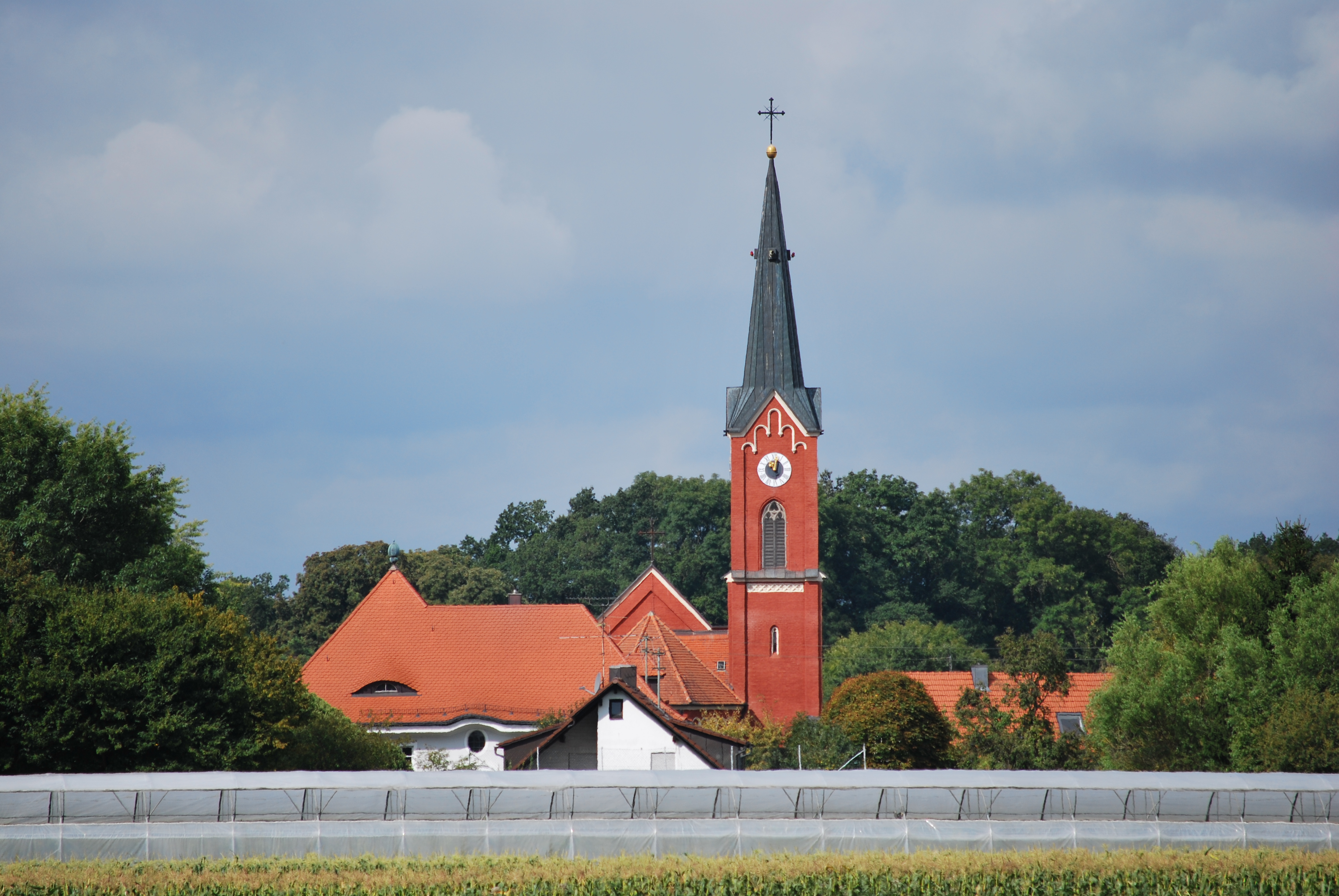 Blick auf St. Leonhard